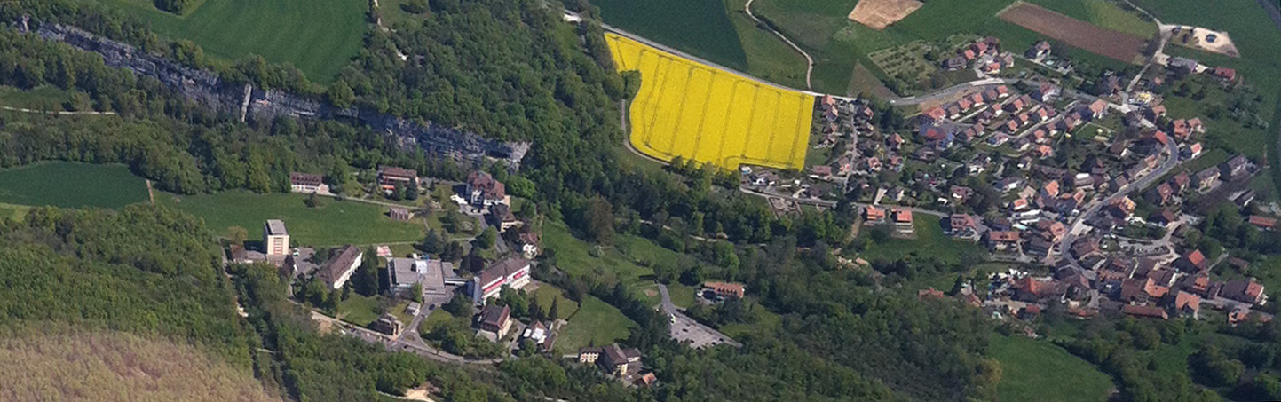 Das Zentrum von Pompaples (rechts) mit Saint-Loup (links)